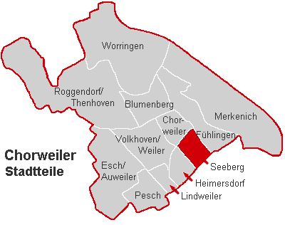 Lagekarte Seeberg im Stadtbezirk Köln-Chorweiler